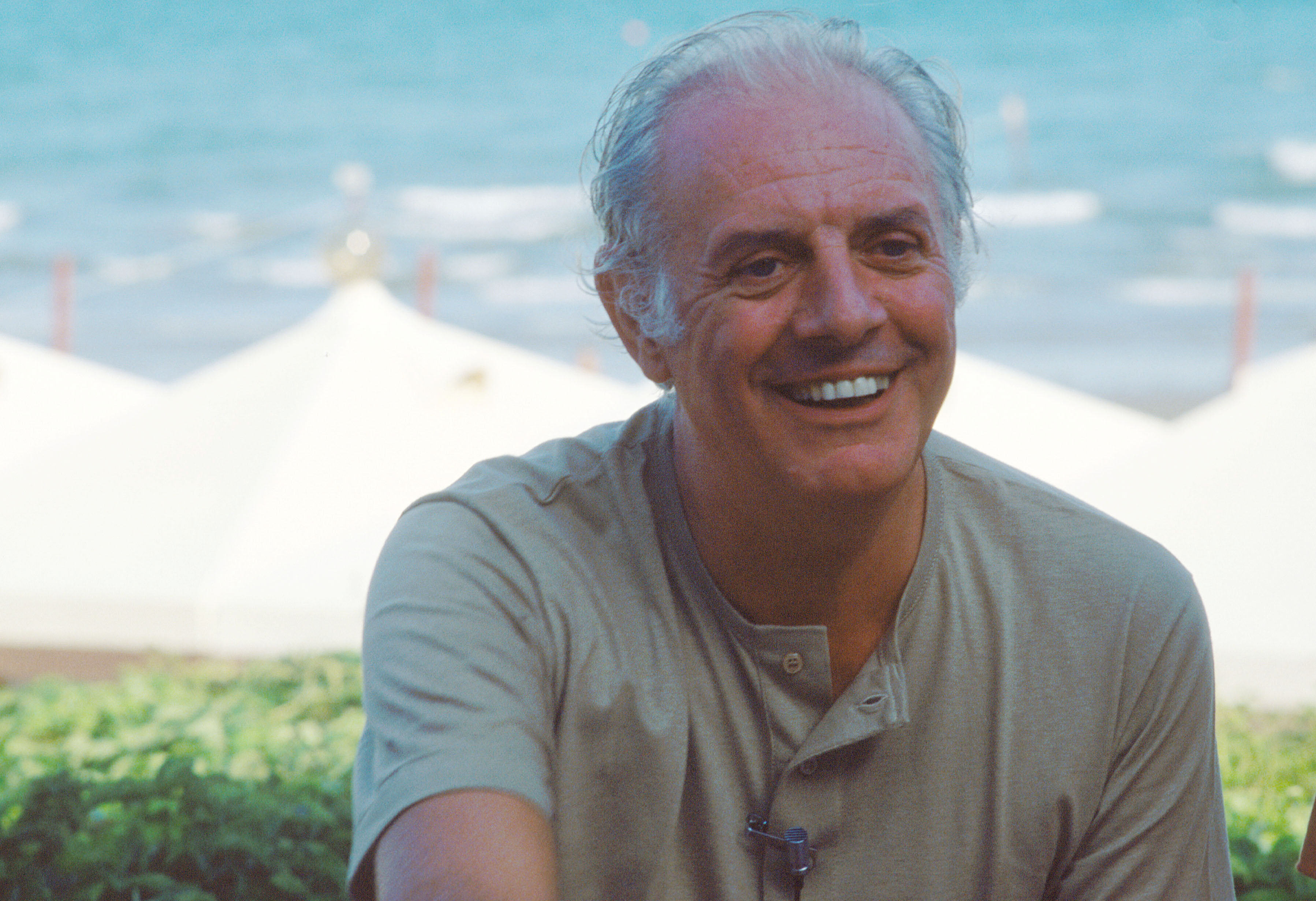 Il drammaturgo e attore Dario Fo alla Mostra del cinema di Venezia